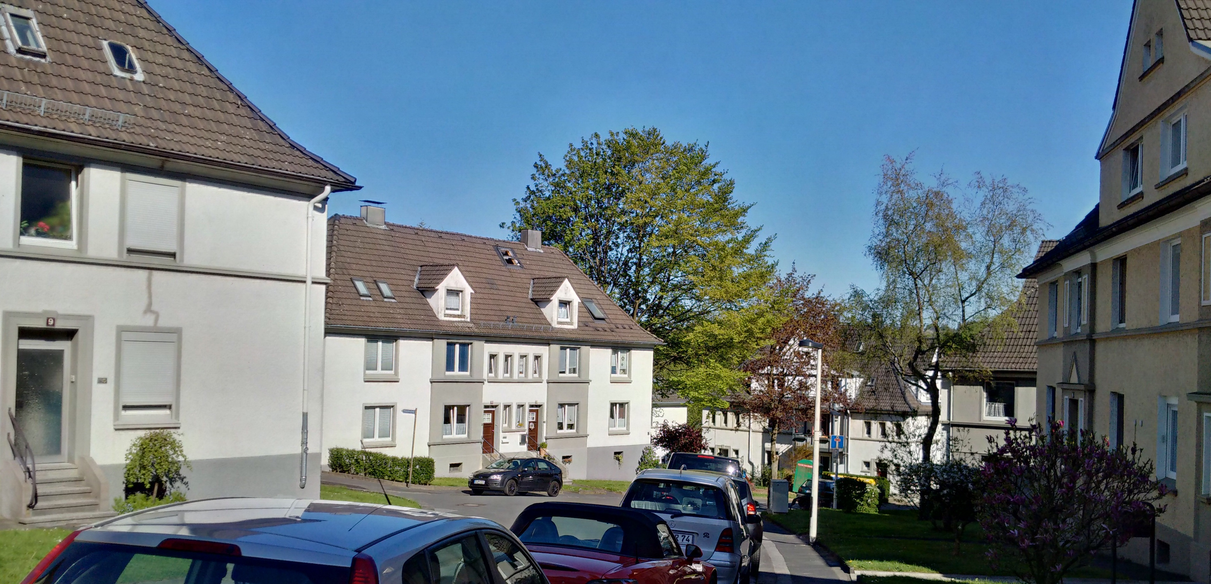 Am Kannenhof Solingen, aufgenommen im Frühling 2016